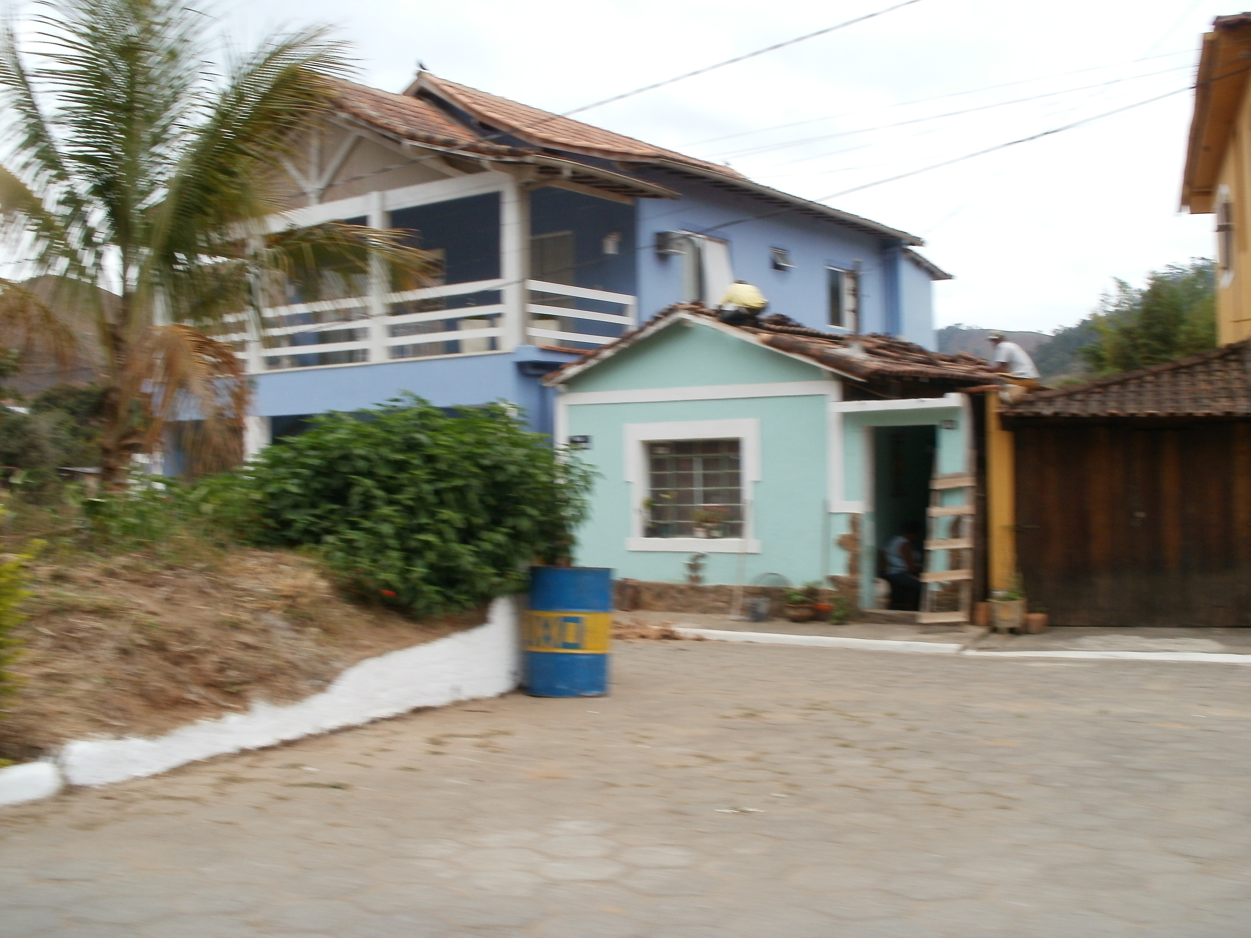 Chalés situados em Santa Rita de Jacutinga-MG, Brasil.